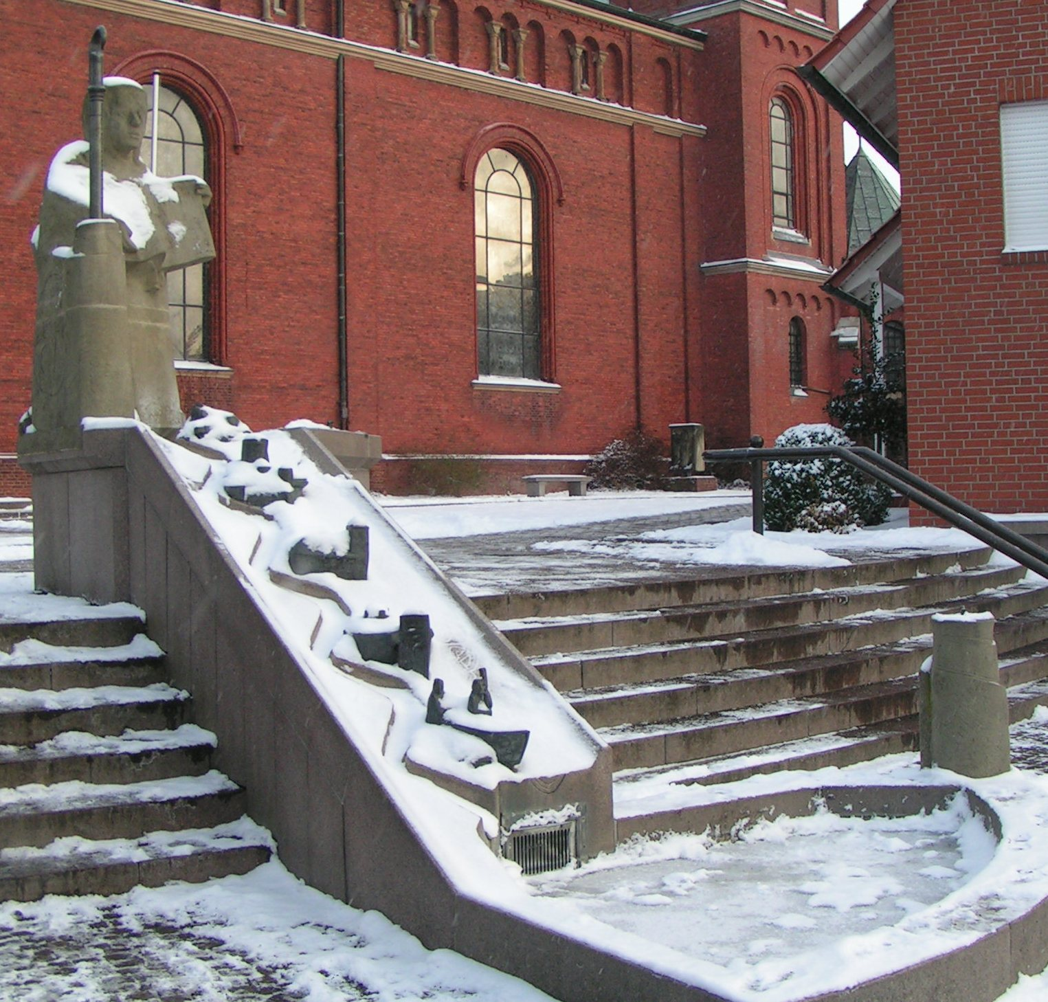 St.-Gertrud-Brunnen in Lohne (Oldenburg), geschaffen 1992/93 von Karl Josef Dierkes (Materialien: Granit und Sandstein)